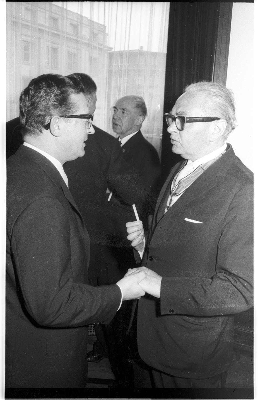 Ministerpräsident Helmut Lemke überreichte Willi Koch die Auszeichnung im Verlagsgebäude in der Fleethörn. Im Bild Landtagsvizepräsident Arthur Schwinkowski (links) gratuliert Willi Koch (rechts). Im Hintergrund Oberbürgermeister Hans Müthling.